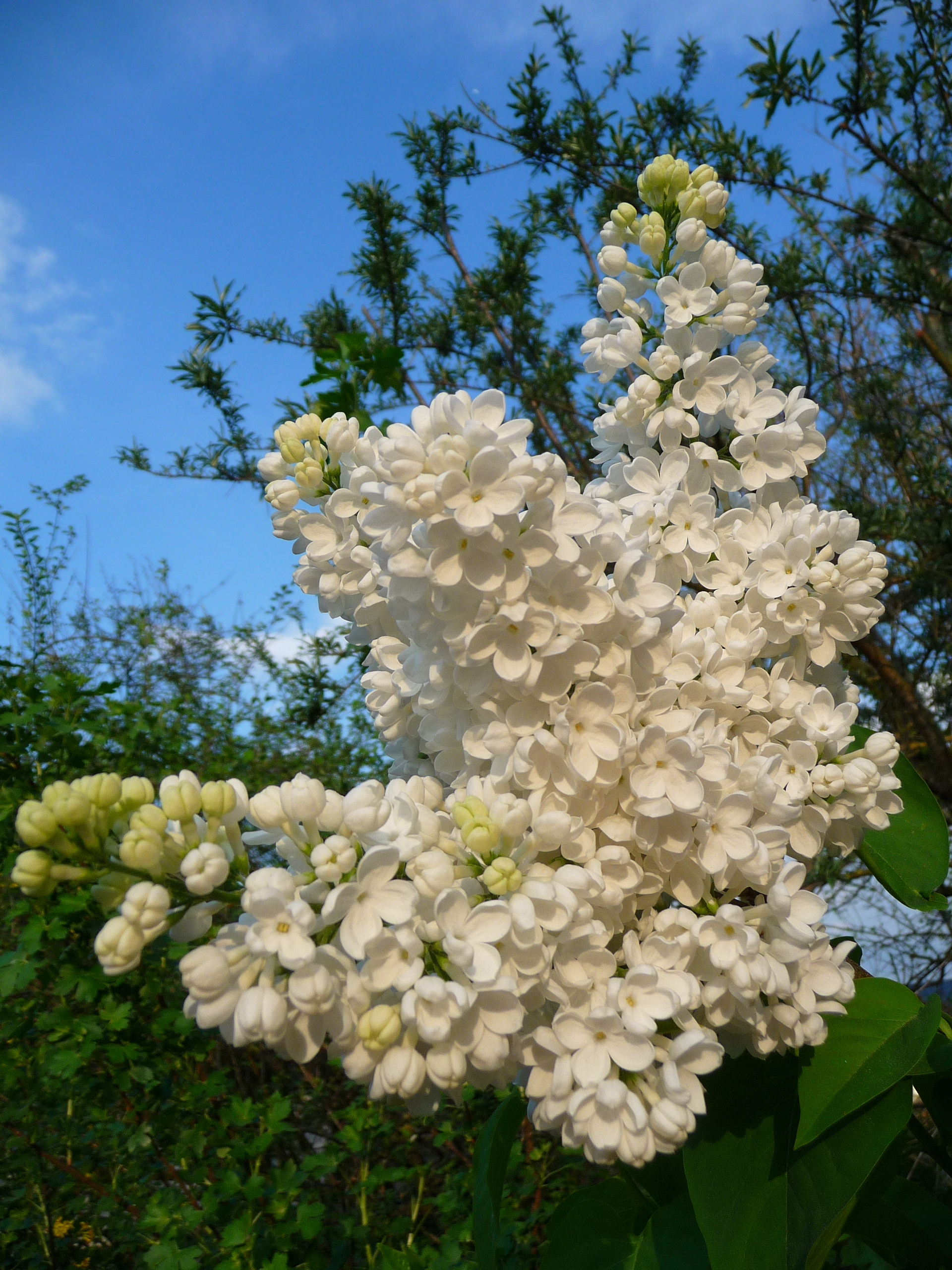 Weißer Flieder: geöffnete Blüten und Knospen